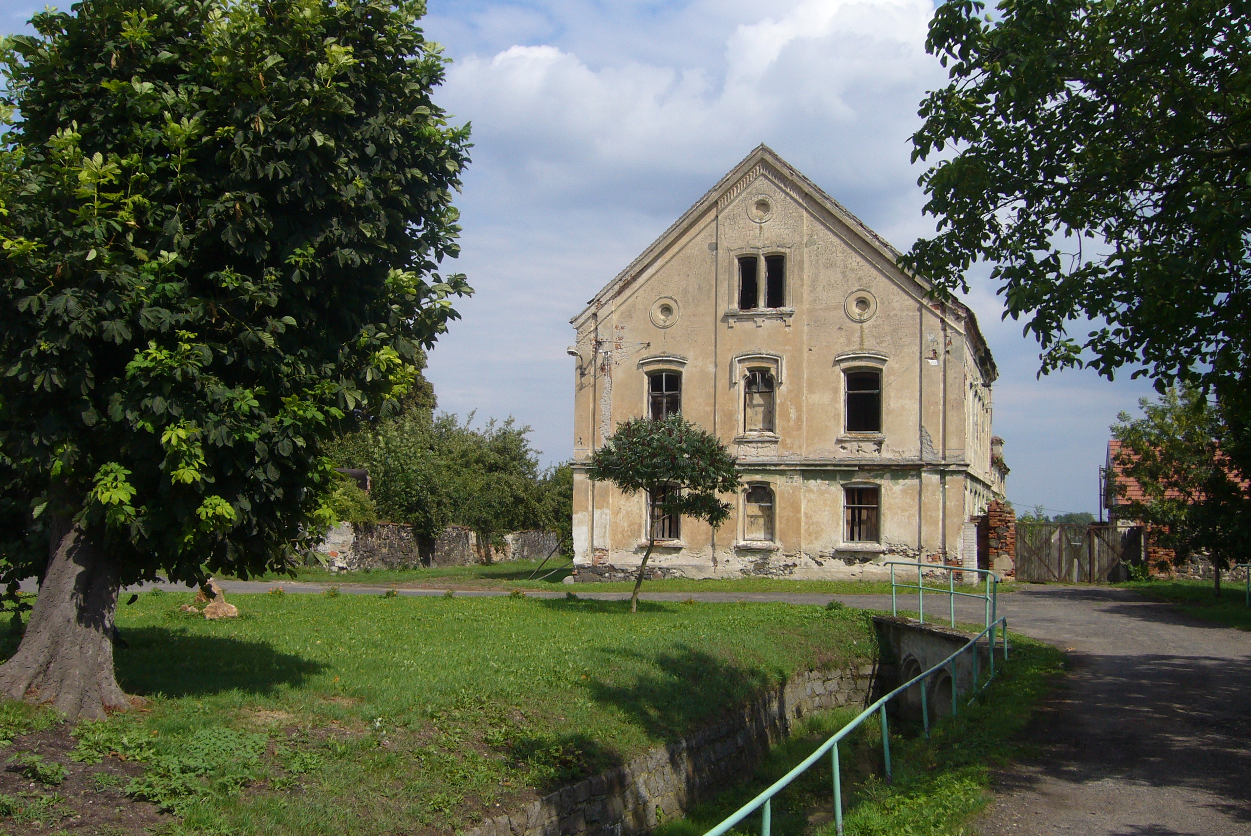 Dům na návsi